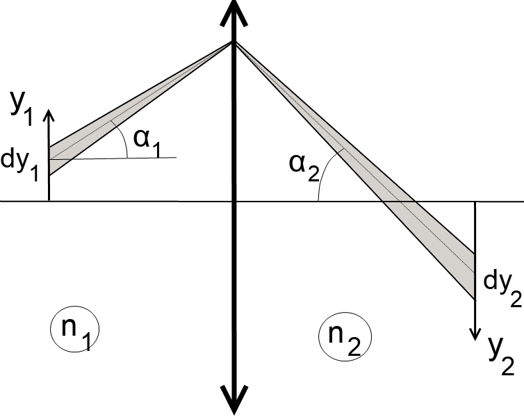 Abbe sine condition